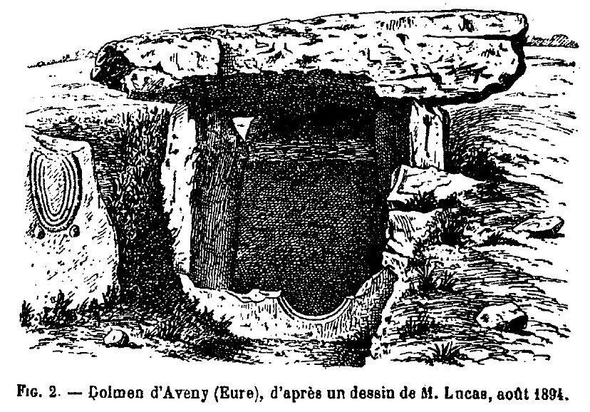 Gravure représentant l'entrée de l'allée couverte de Dampsmesnil en 1894 après la découverte de la partie inférieure de la dalle percée